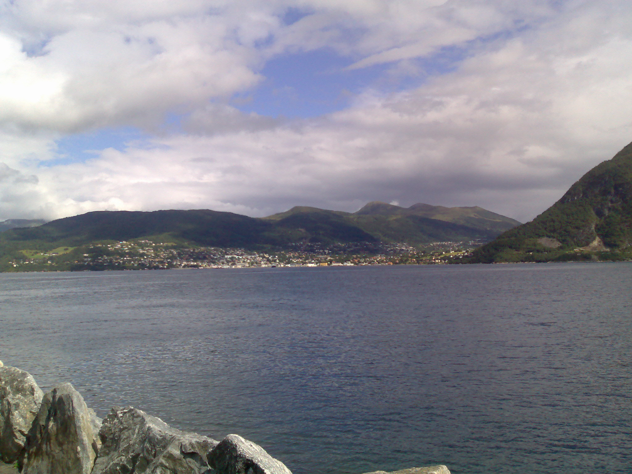 Volda sett fra Folkestad.